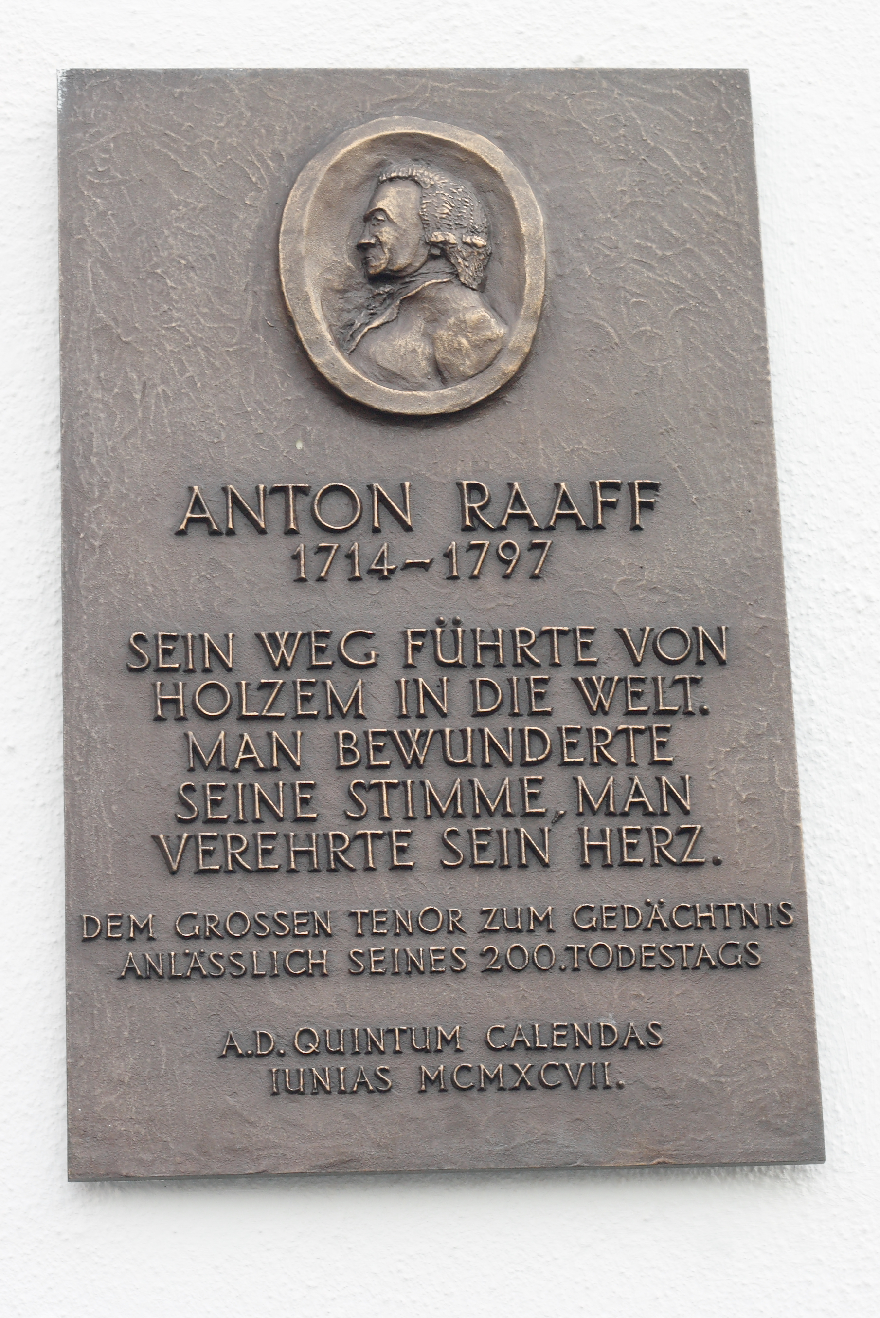 Gedenktafel für Anton Raaff an der St. Johannes Nepomuk-Kapelle in Holzem, einem Ortsteil von Wachtberg